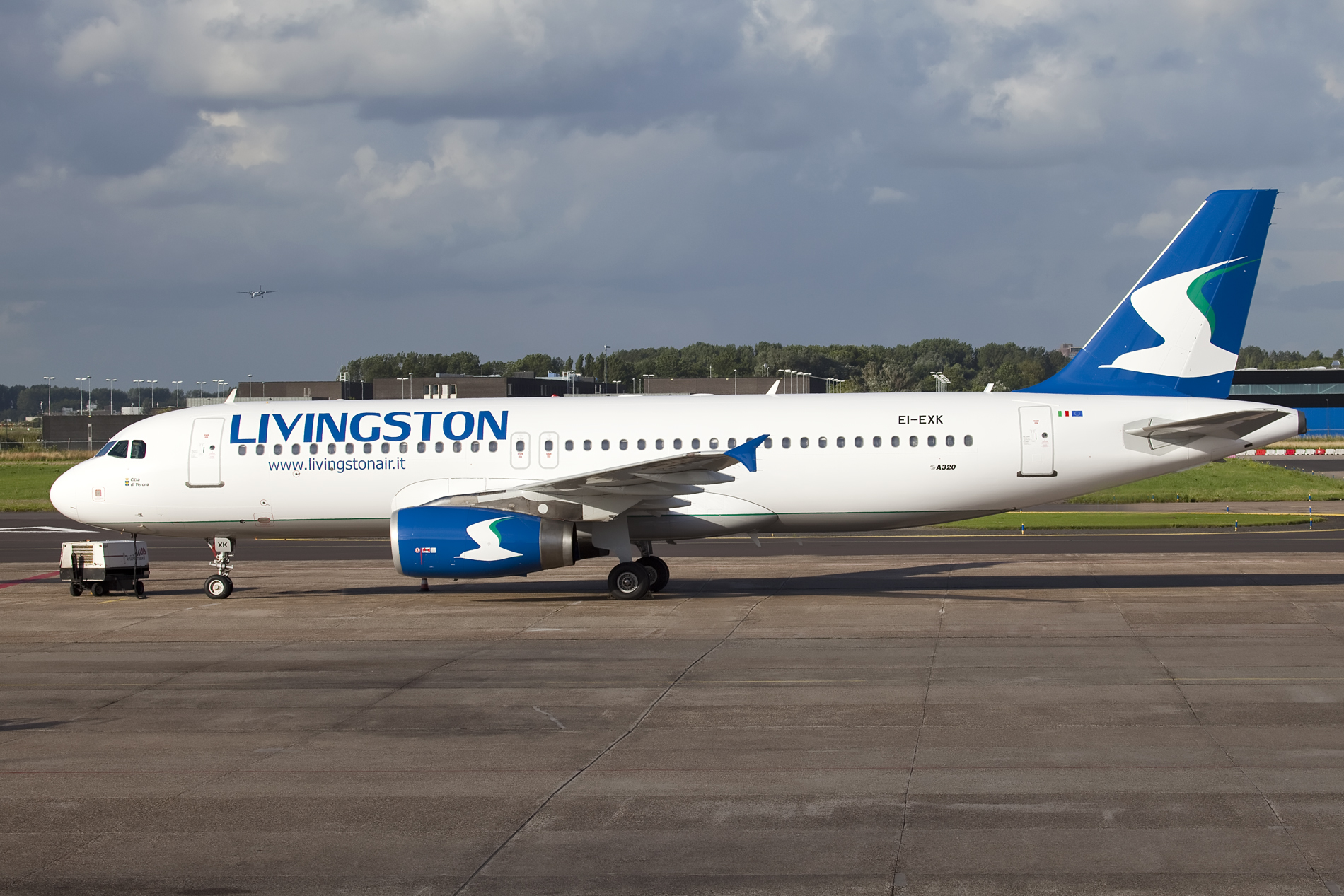 Rotterdam